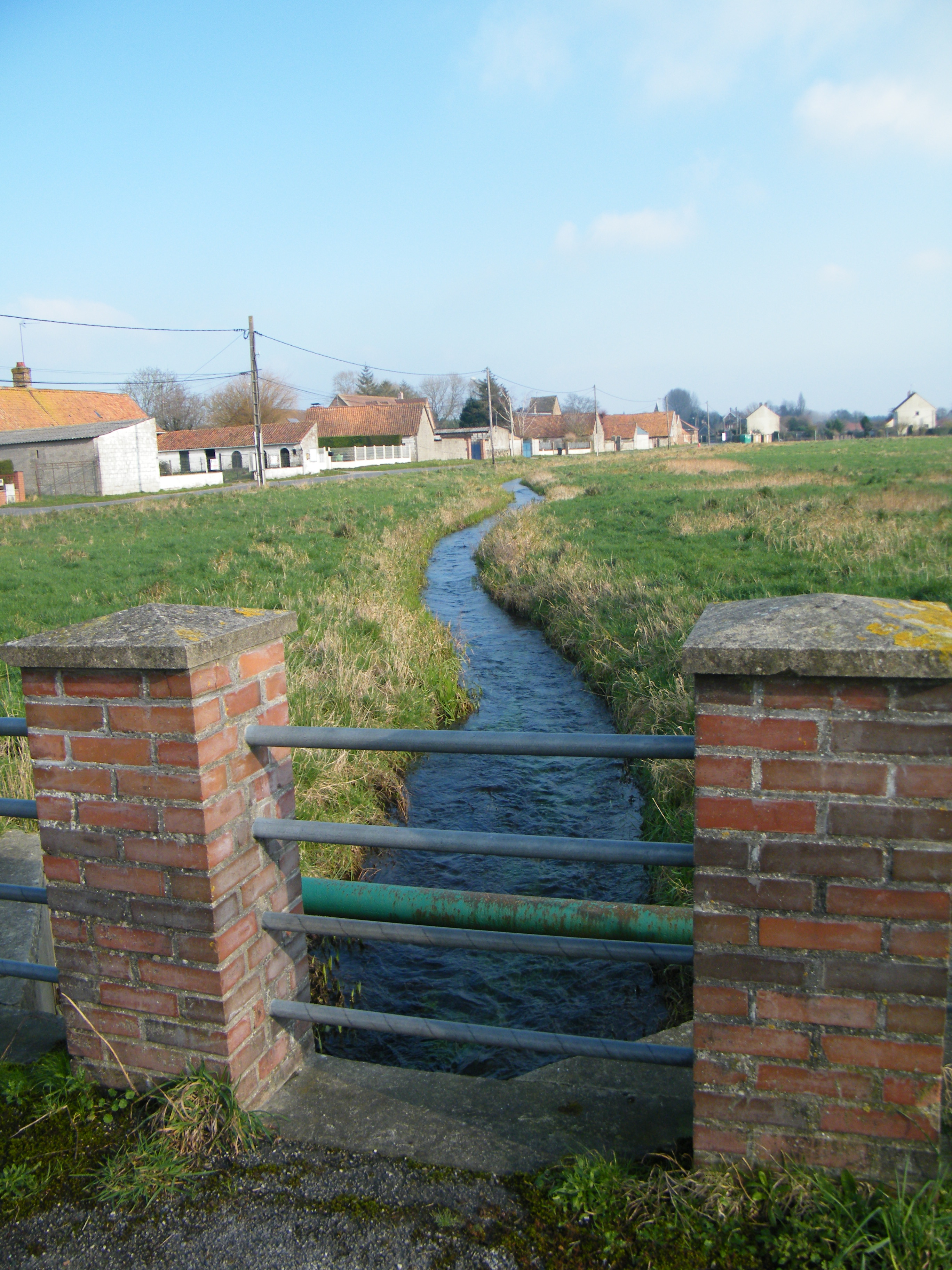 Forest-Montiers, Somme, Fr Neuville, la Neuville à sa sortie du petit marais (amont), 5 février 2018.